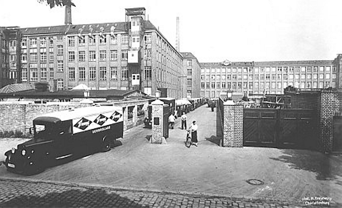 Eingangsbereich der Trumpf Schokoladenfabrik in Berlin-weißensee